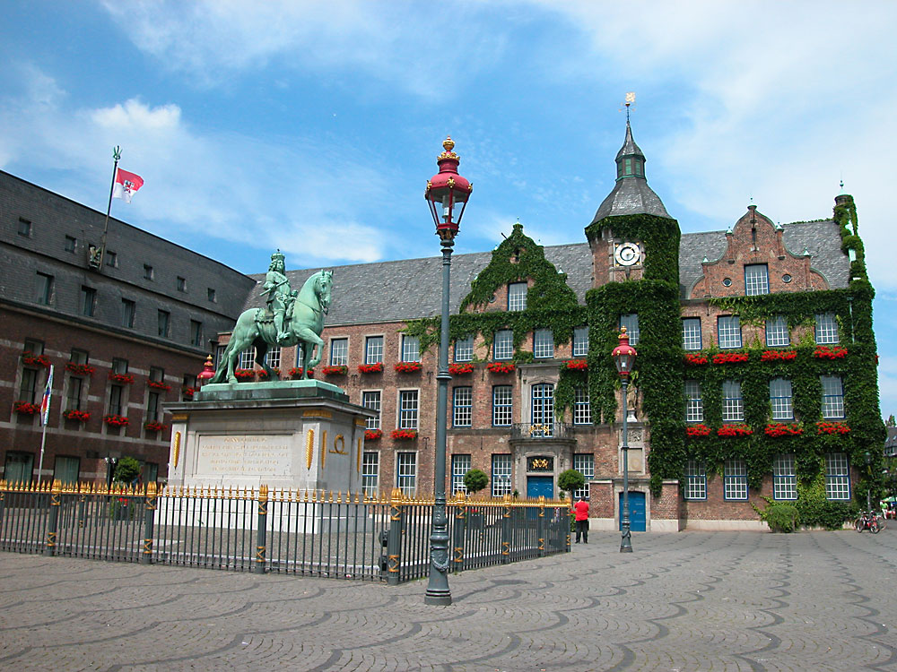 Düsseldorf, Marktplatz. Blick von Süden nach Norden